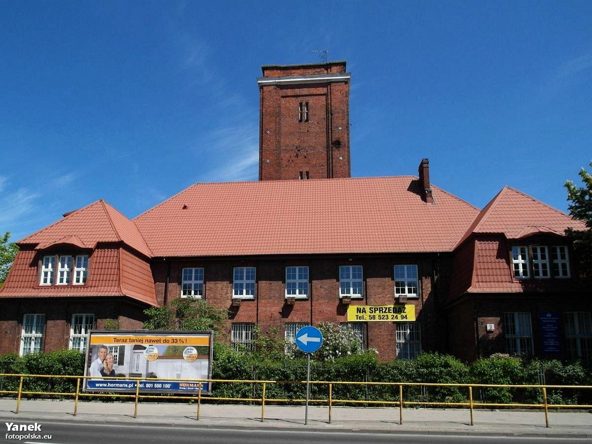 Gdańsk Wrzeszcz, Aleja Legionów 9 - budynek z wieżą obserwacyjną d. koszar telegrafistów. Widok od strony pl. Wybickiego.